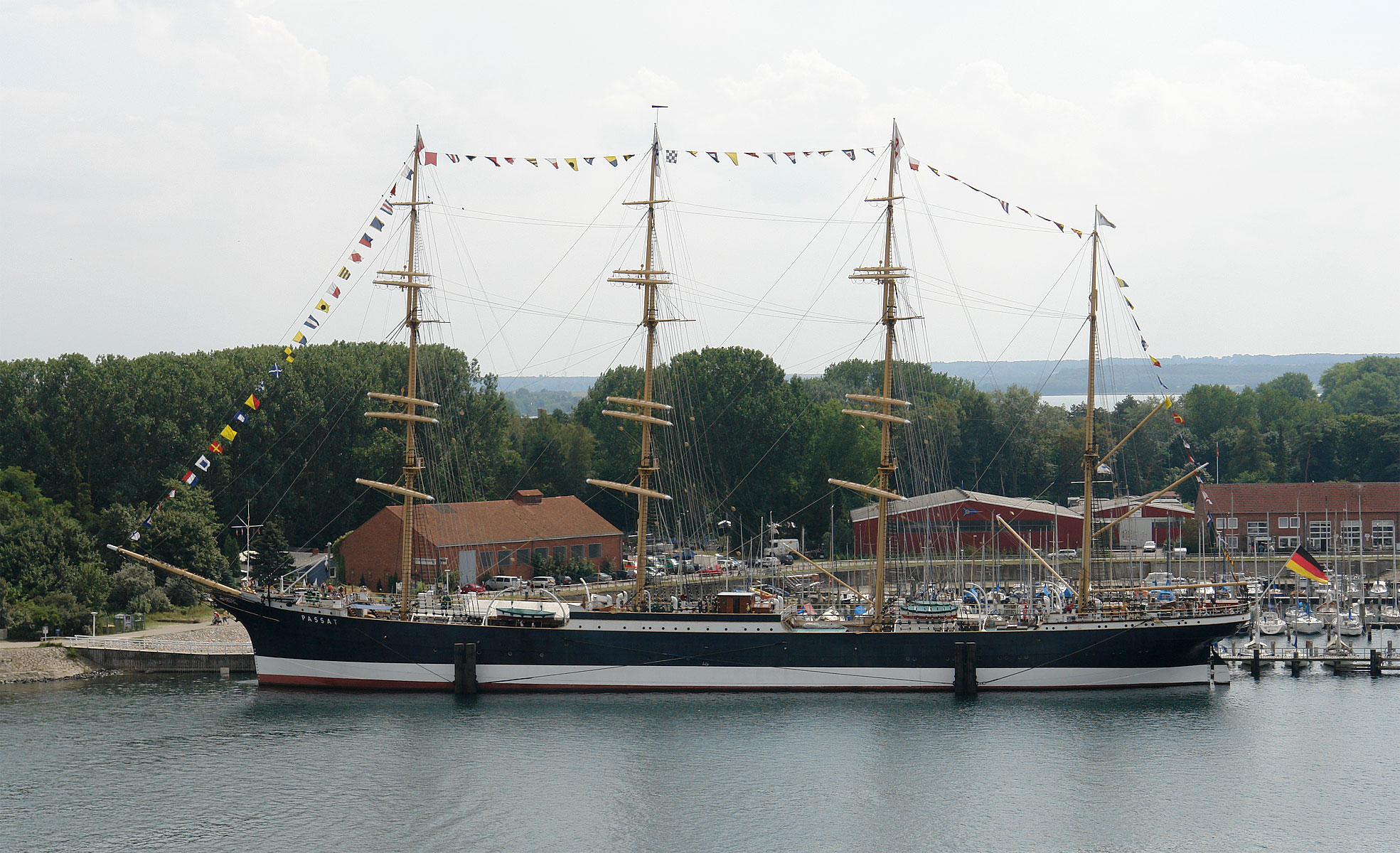 Viermast-Stahlbark Passat, ein Museumsschiff in Travemünde. Blick vom alten Leuchtturm.